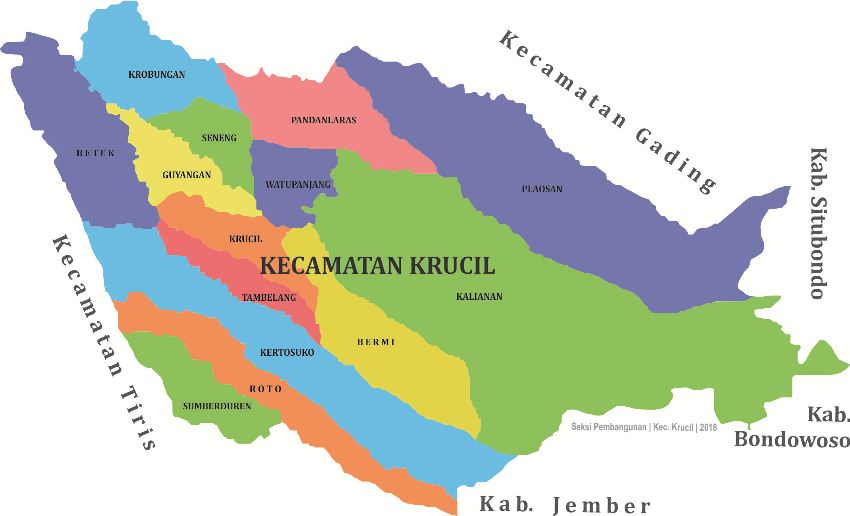 Peta 14 Desa di Kecamatan Krucil Kabupaten Probolinggo